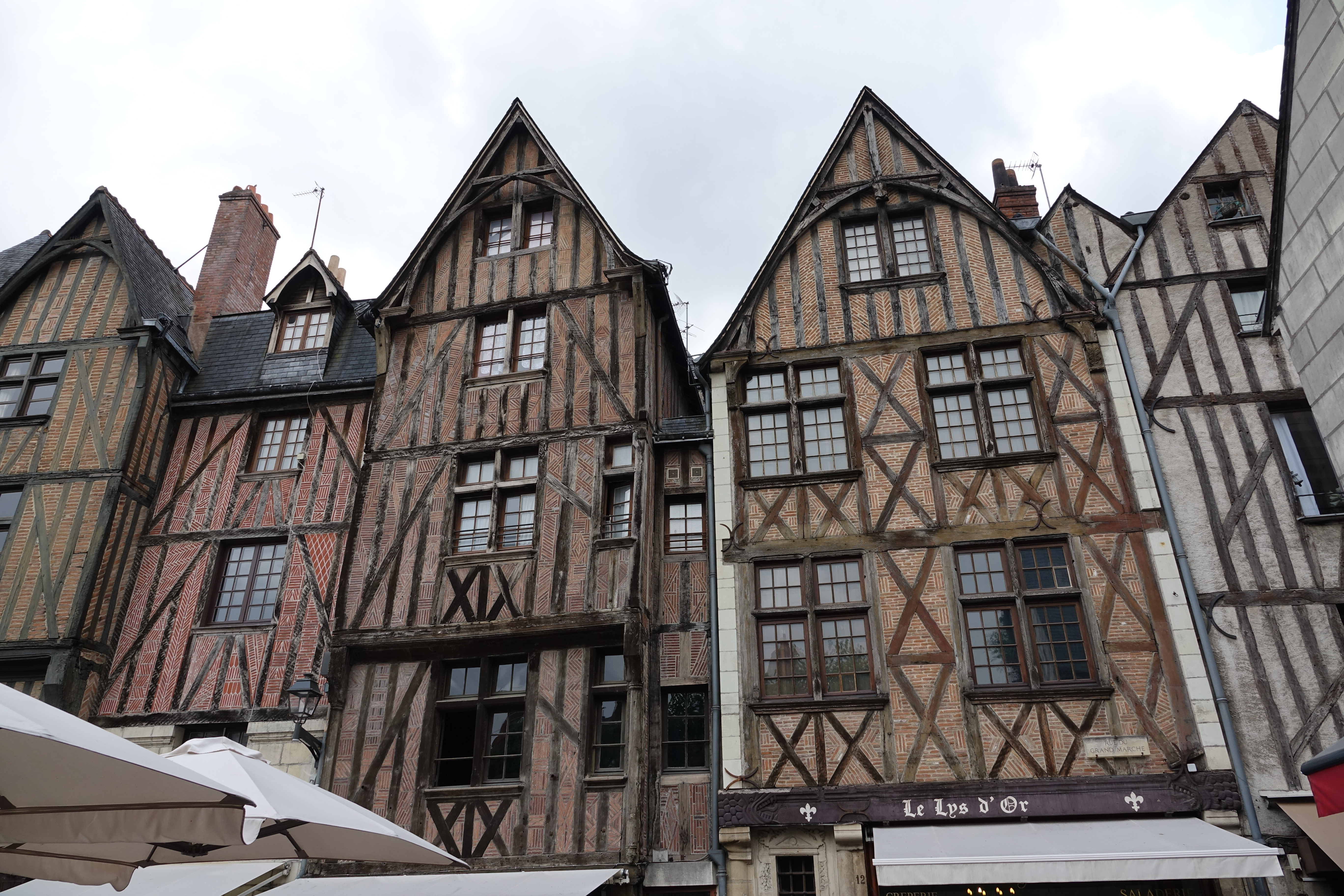 Maisons sur la place Plumereau à Tours (Indre-et-Loire, France).